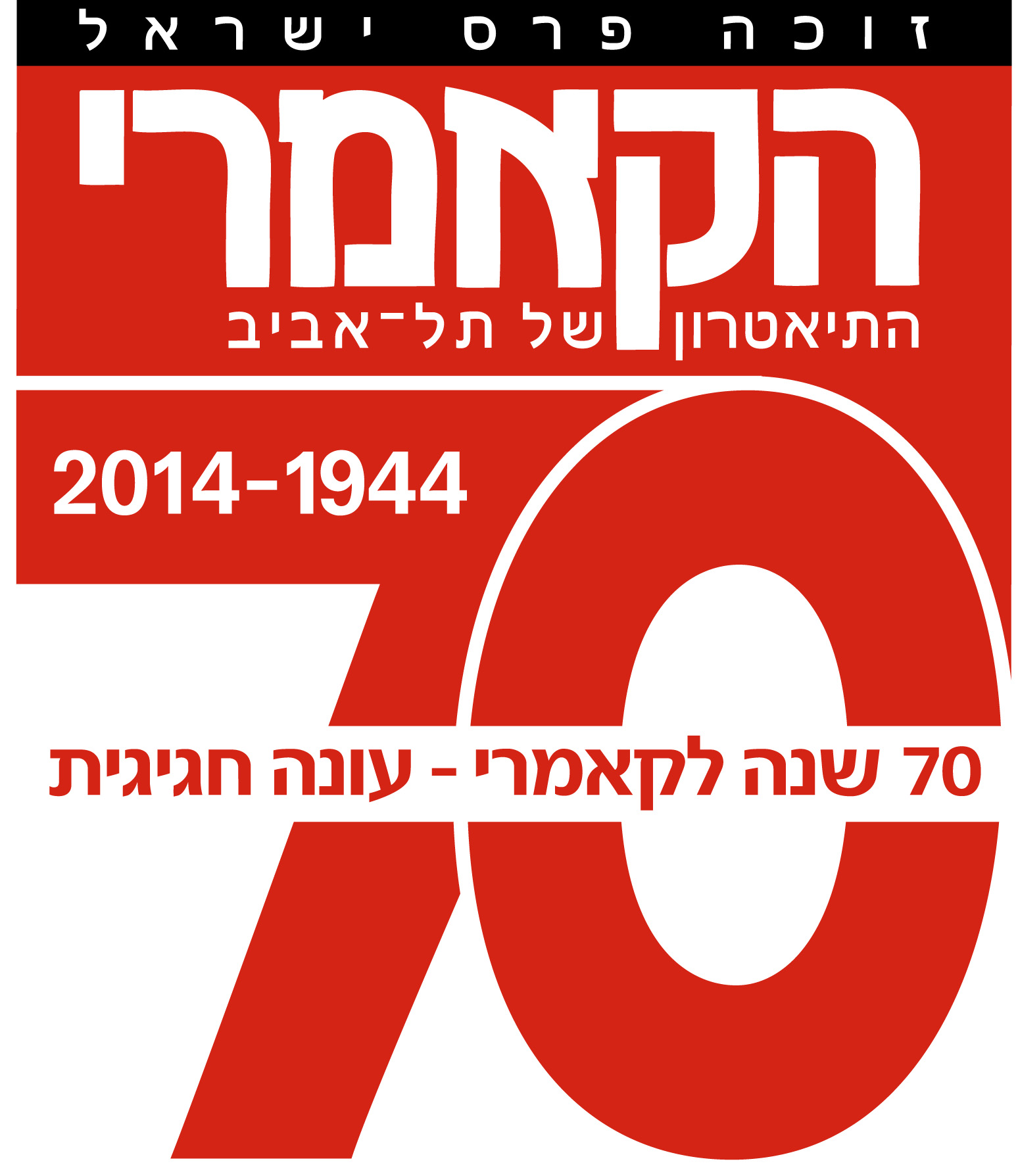 לוגו הקאמרי לרגל חגיגות ה-70